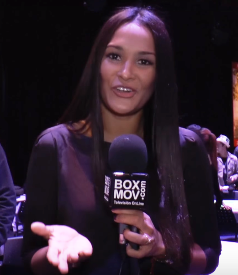 La actriz Jeymmy Paola Vargas hablando de su personaje en la telenovela Los Morales de Caracol Televisión